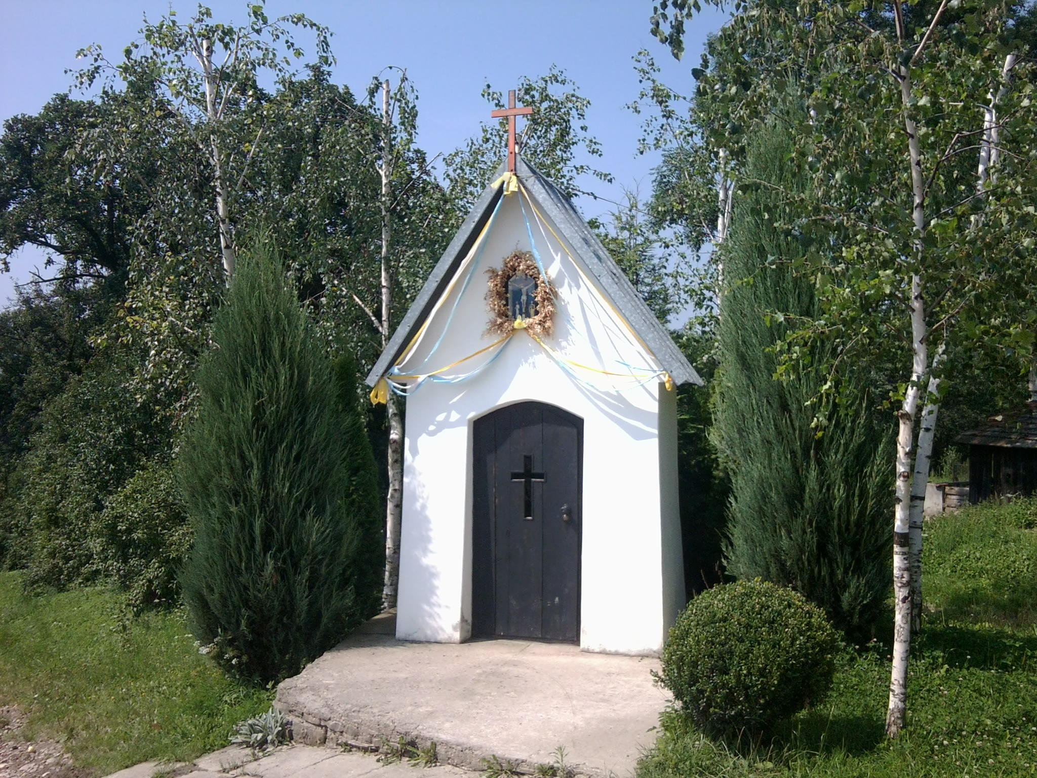 Kaplica Męki Pańskiej w Rogach